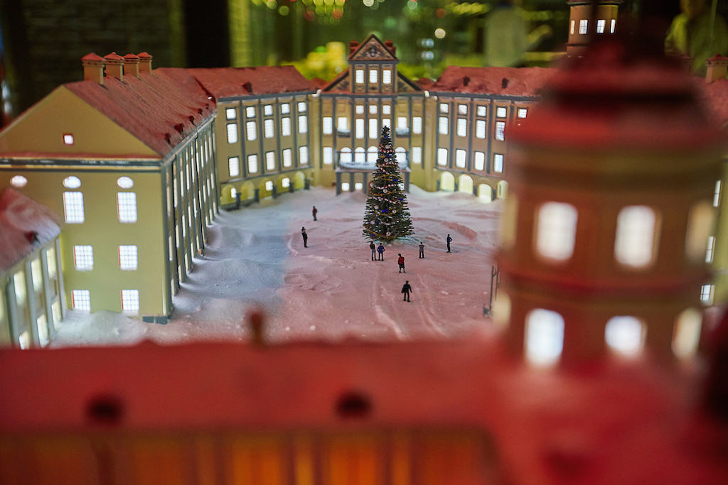 Интерактив "день и ночь" (Несвижский замок)